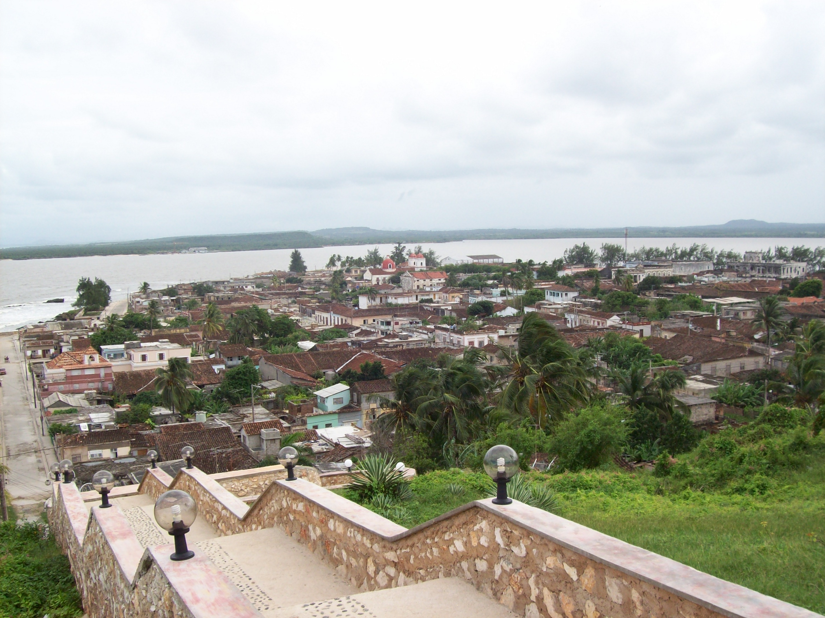 Vista panoramica de la ciudad de Gibara